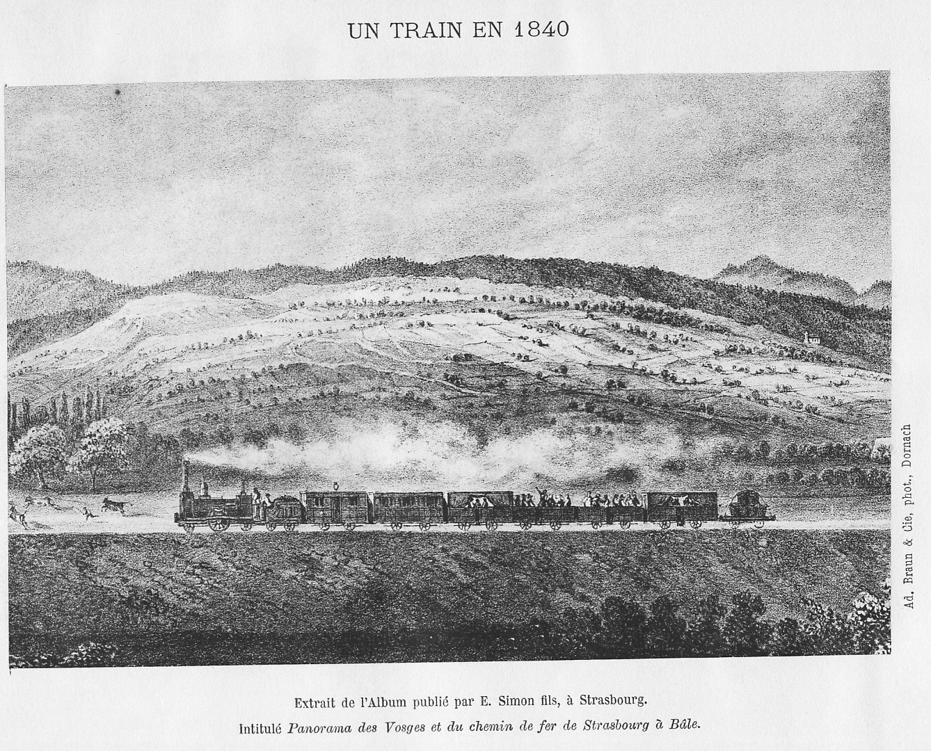 Un train en 1840 sur le chemin de fer de Strasbourg à Bâle.